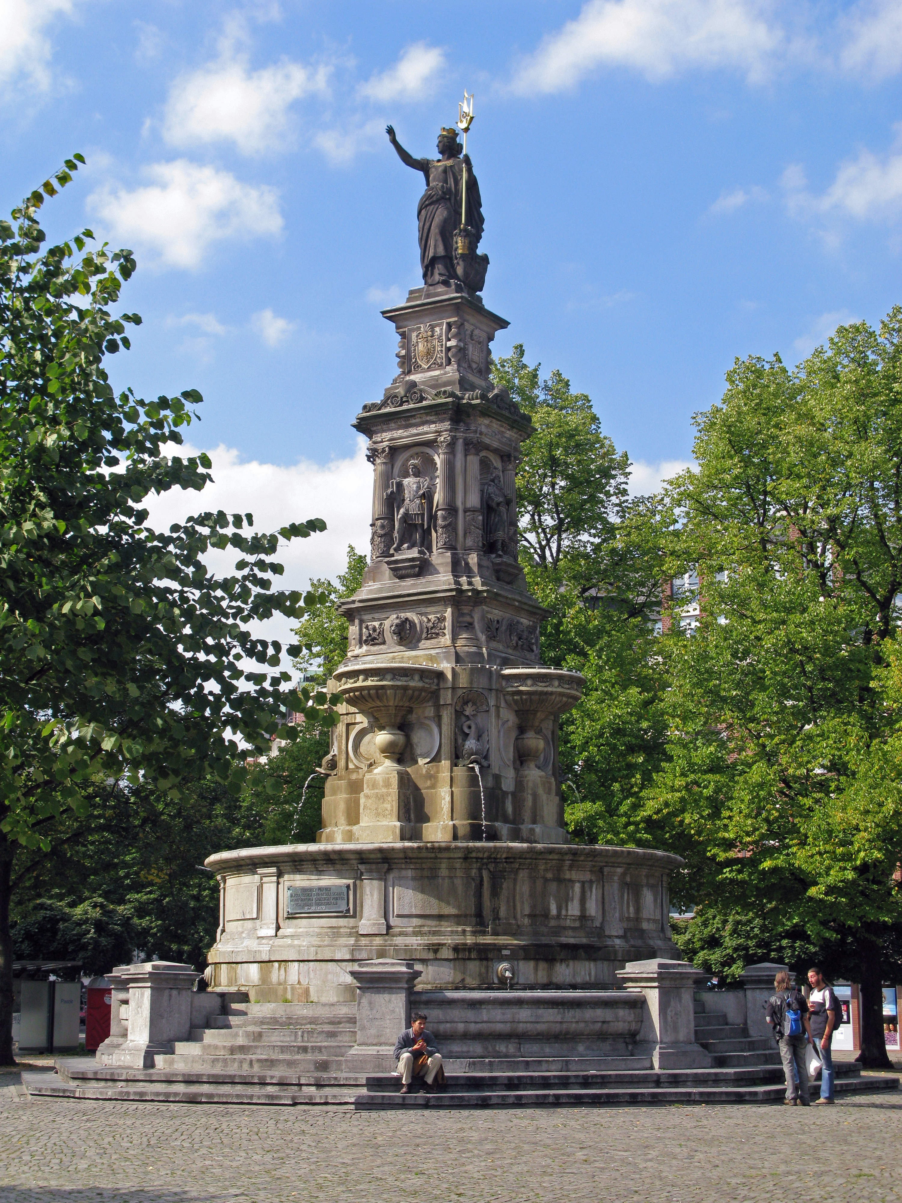 Hansa-Brunnen, Fountain in Hamburg